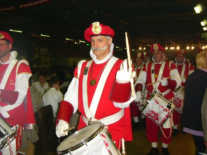 Stand Austriafestival.